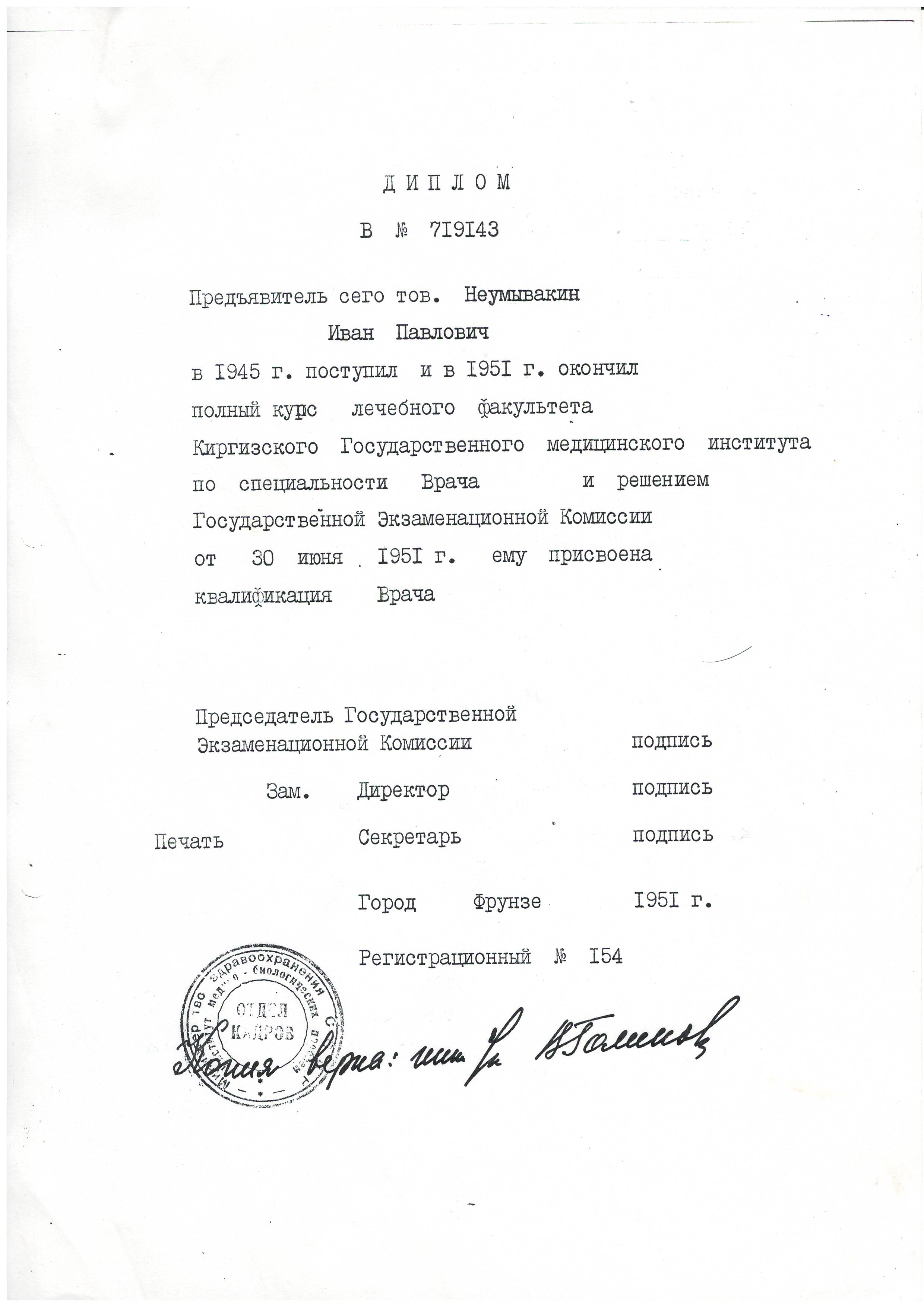 Диплом Киргизского Государственного медицинского института